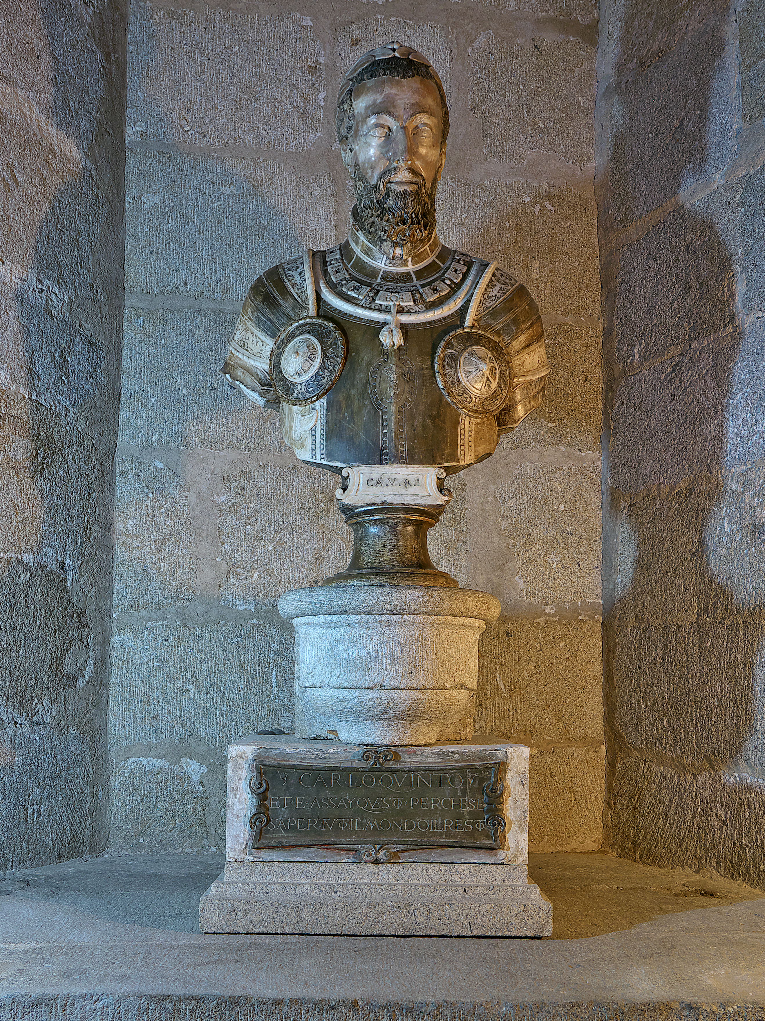 Carlos I obsequia, en prueba de agradecimiento, a su amigo Luis de Ávila y Zúñiga con un magnífico busto de mármol, posible obra de Leone Leoni y Pompeo Leoni (h 1555).